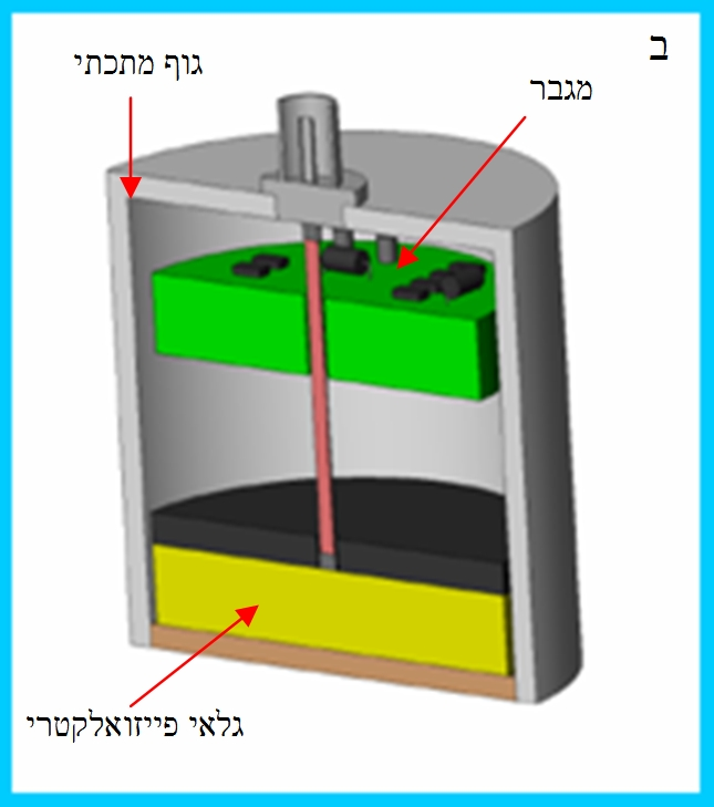 Figure 2B רישיון נוצר על ידי משתמש:Boris.muravin